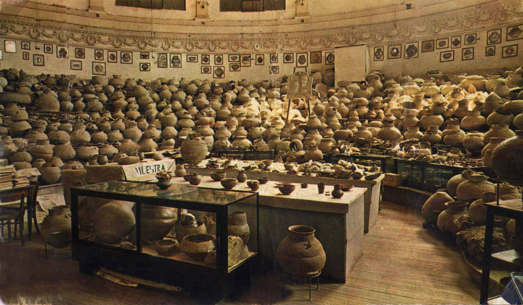 Antiguo Museo Arcaico que funcionaba en el anfiteatro del Colegio del Centenario en la ciudad de Santiago del Estero, Argentina. Posteriormente pasó a llamarse Museo de Ciencias Antropológicas y Naturales "Emilio y Duncan Wagner".